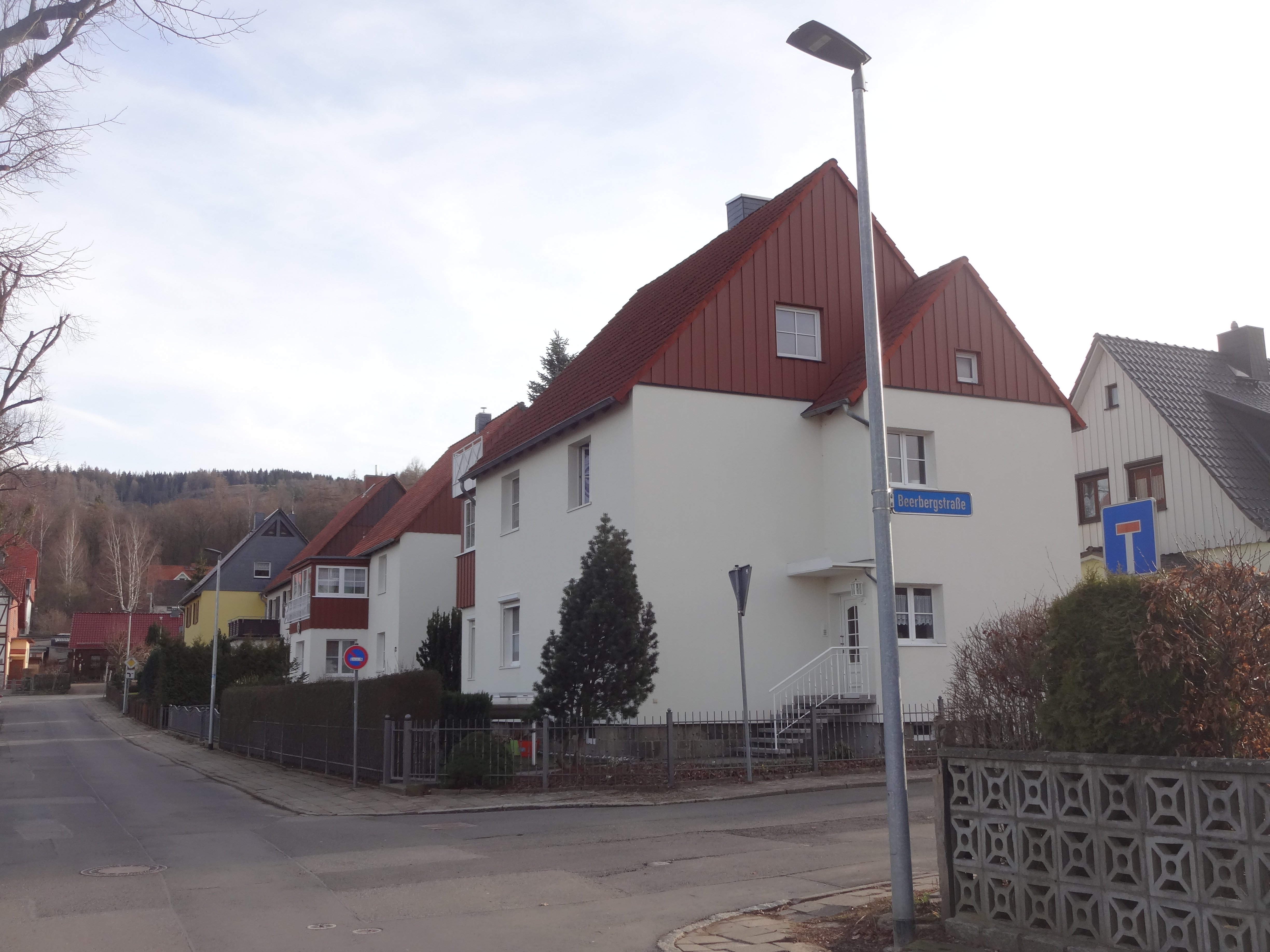 Teil der ehemals geschützten Häusergruppe Mannsbergstraße 10, 12, 14, 16, Rosa-Luxemburg-Straße 30 in Wernigerode